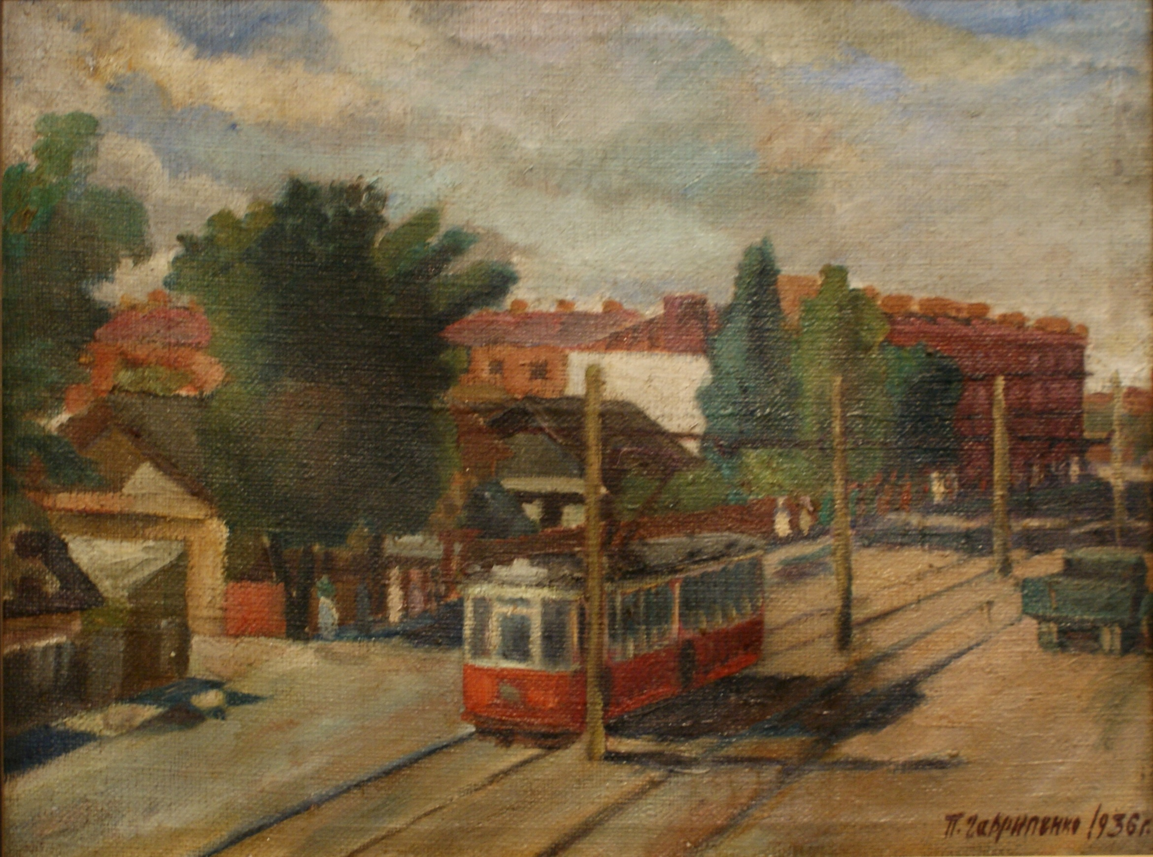 Гаўрыленка П. Н. Мінск. Маскоўская вуліца. Палатно, алей